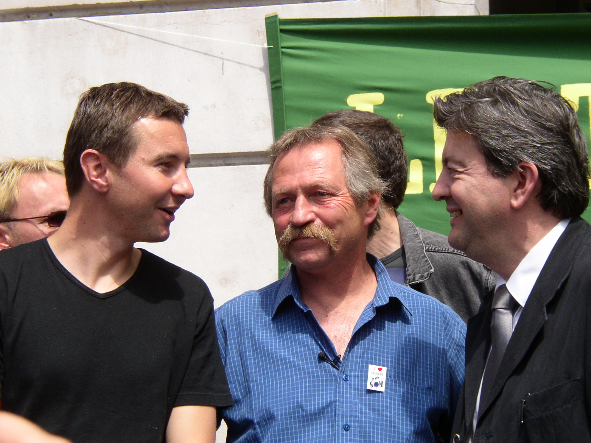 Paris (Île-de-France, France) : Olivier Besancenot, José Bové et Jean-Luc Mélenchon devant la gare Saint-Lazare lors d’un meeting pour le non au référendum sur la Constitution européenne.